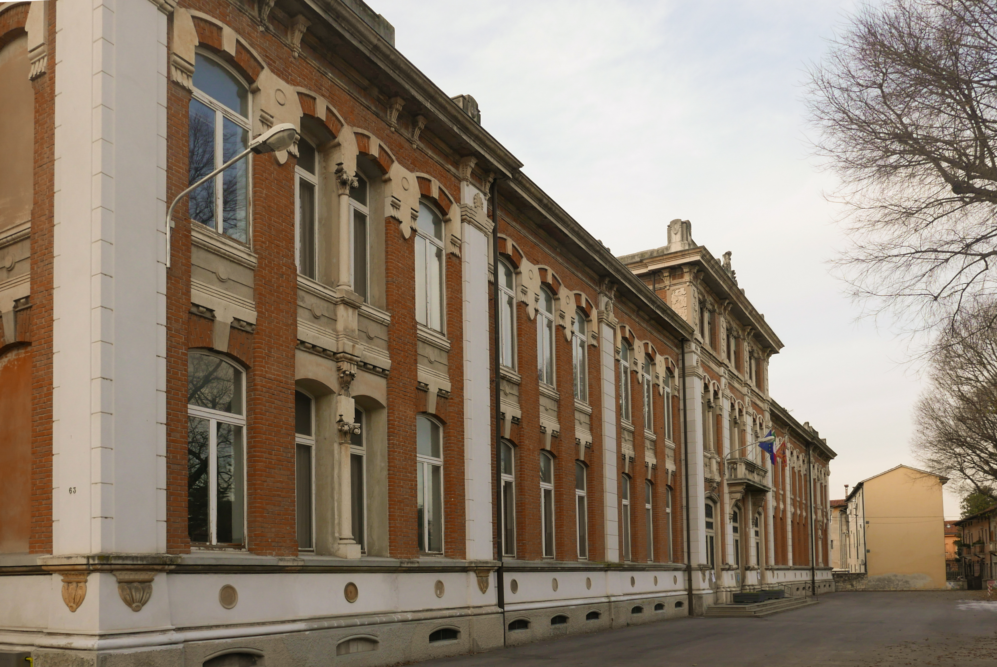 Scuola primaria Porta Padova